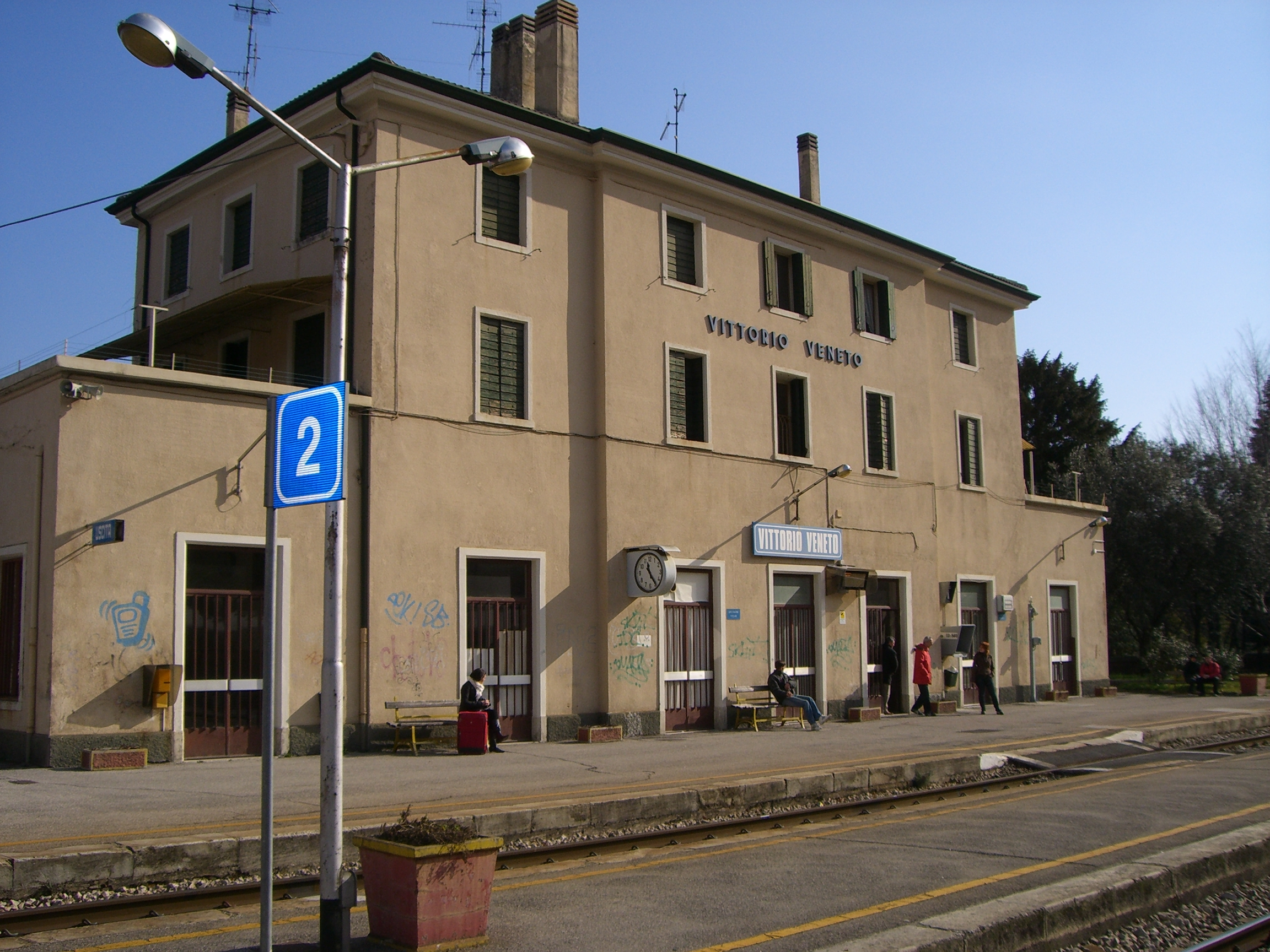 Facciata posteriore della stazione di Vittorio Veneto